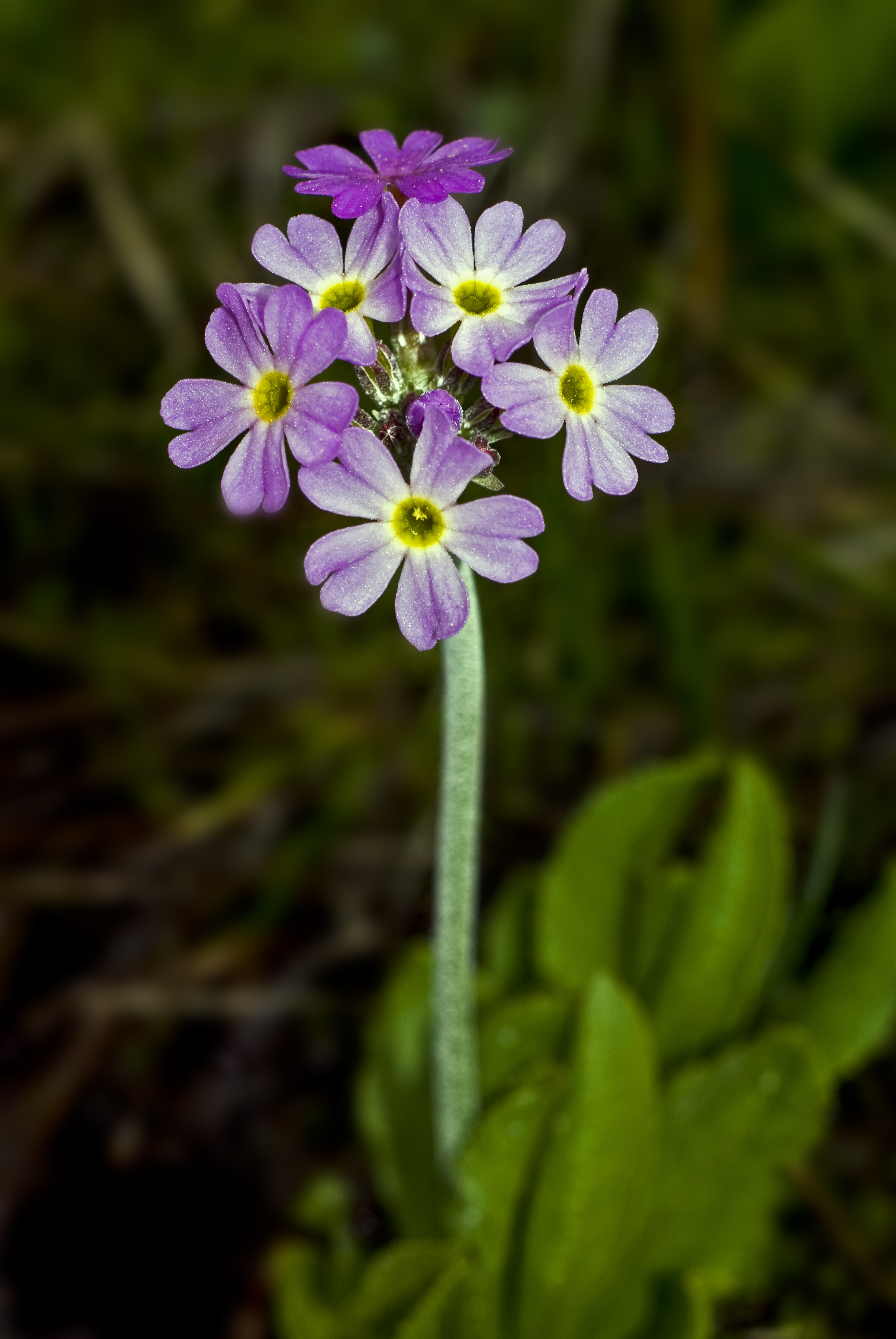 Bursa / Uludağ